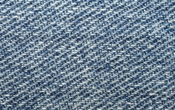 Detail dzinove tkaniny